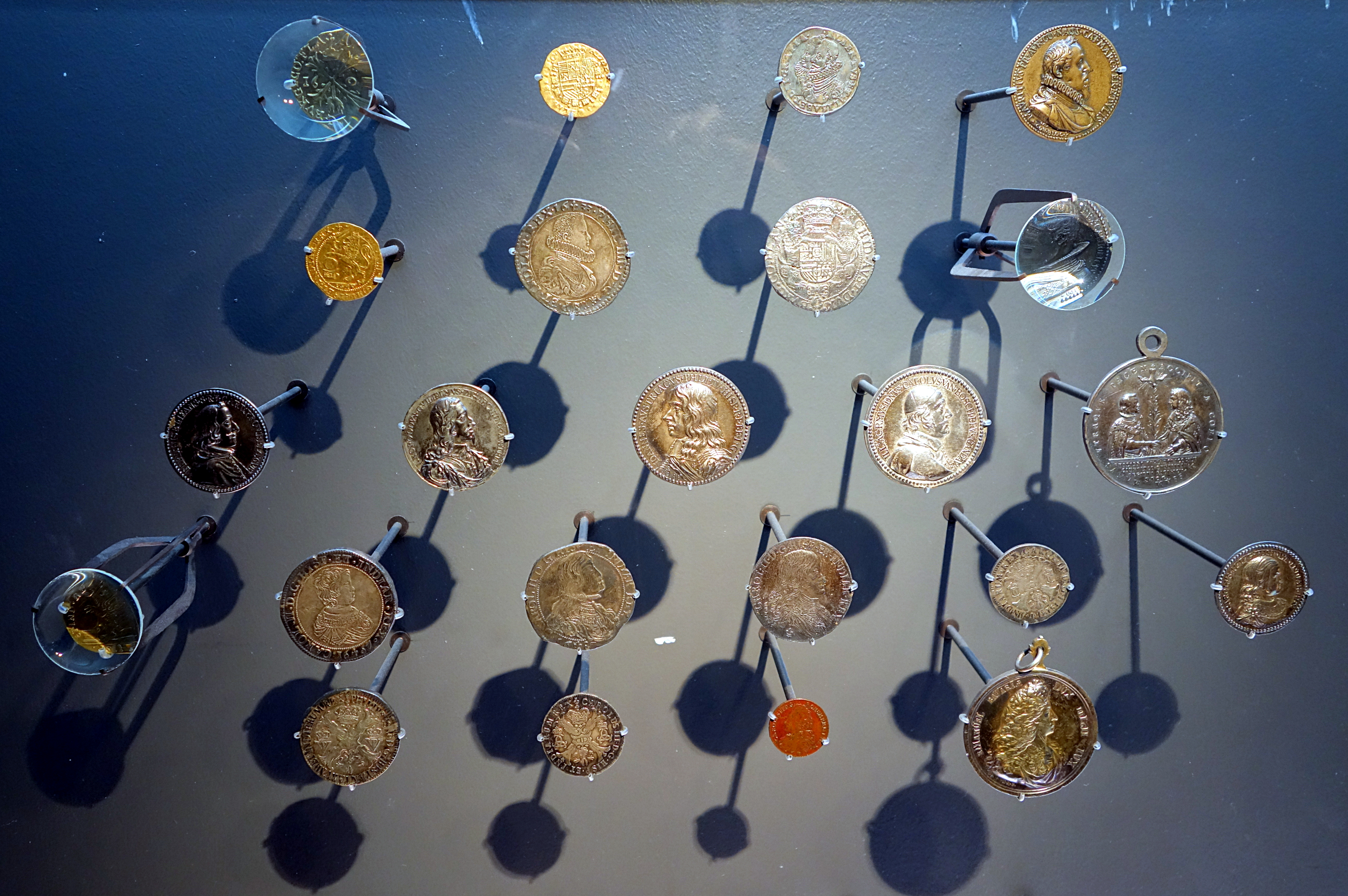 Monnaies et médailles flamandes au Palais des beaux-arts de Lille.